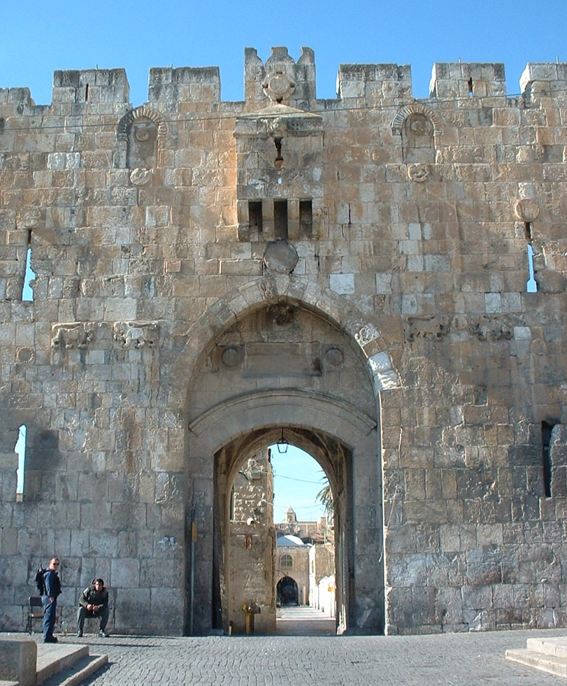 Lions' Gate, Jerusalem.